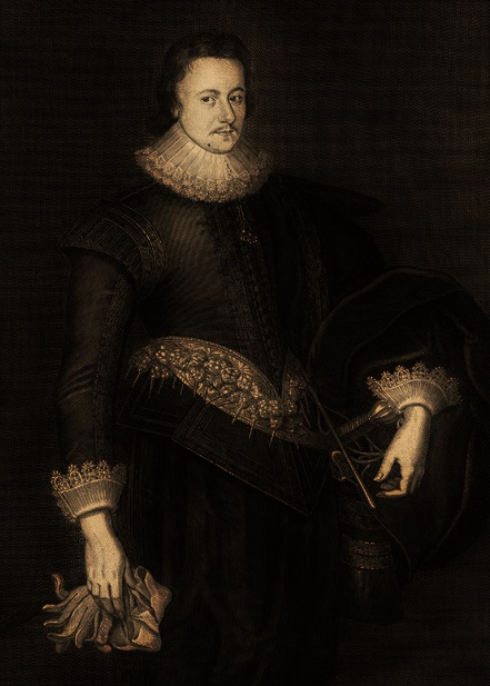 Сэр Мартин Листер, рыцарь, 1626 г.